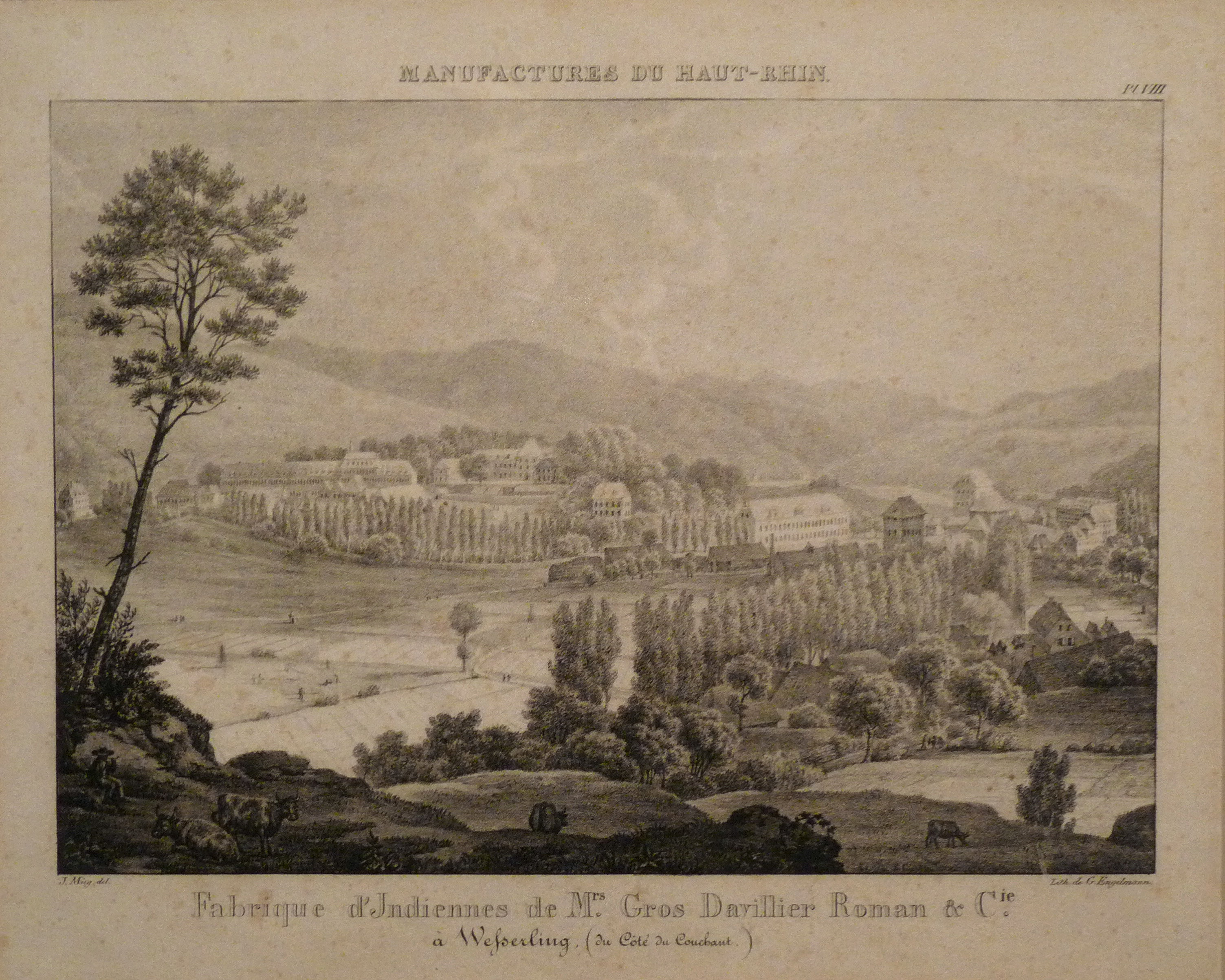 Fabrique d'indiennes de Mrs. Gros Davillier Roman & Cie à Wesserling (du côté du couchant) : lithographie de G. Engelmann, de la série Manufactures du Haut-Rhin, réalisée entre 1822 et 1825 ; dessin de J. Mieg (Musée d'impression sur étoffes de Mulhouse)